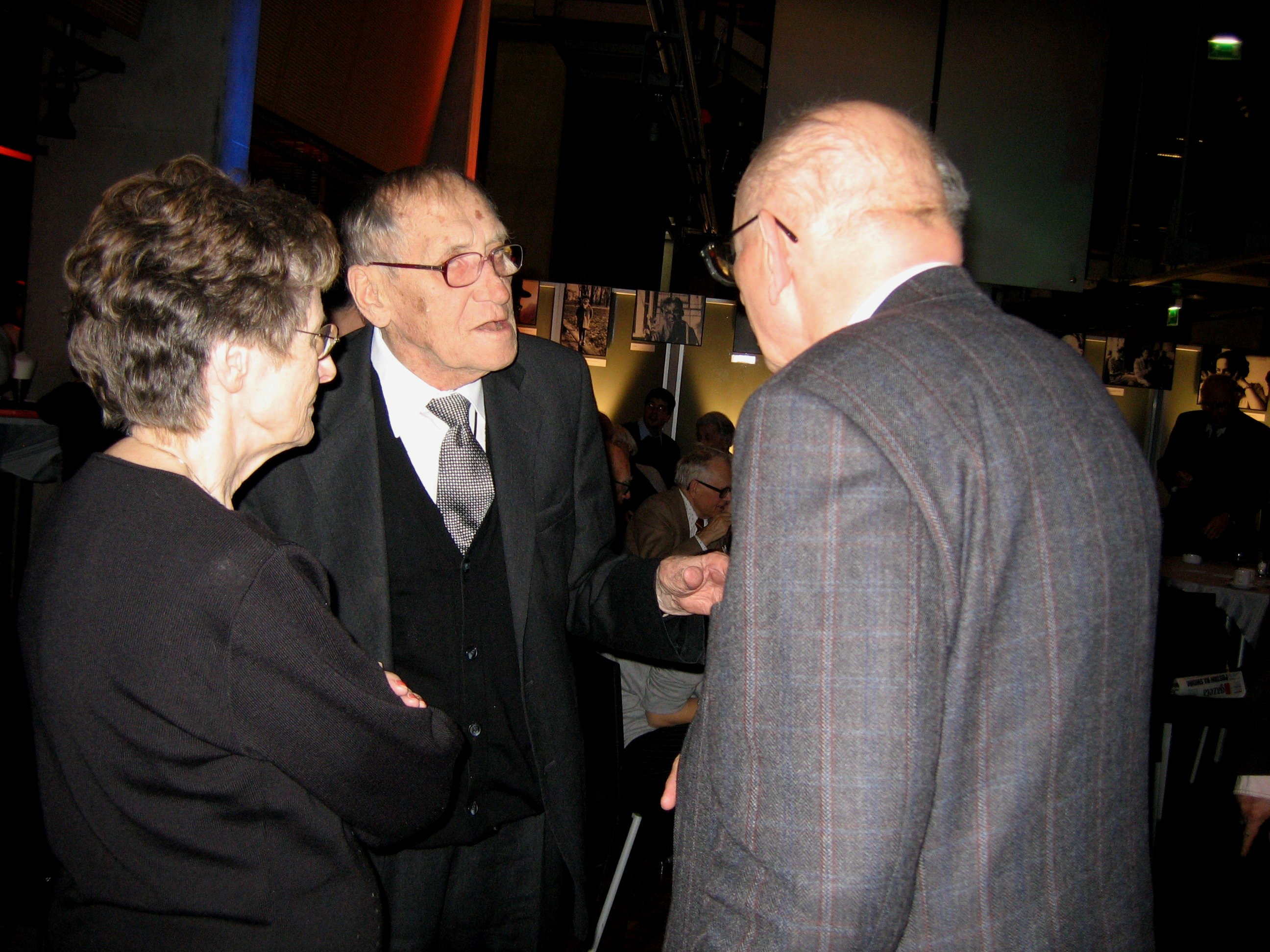 Leszek Kołakowski (1927-2009), Polish philosopher and Zofia Bartoszewska and Władysław Bartoszewski (1922-2015), Polish historian and politician